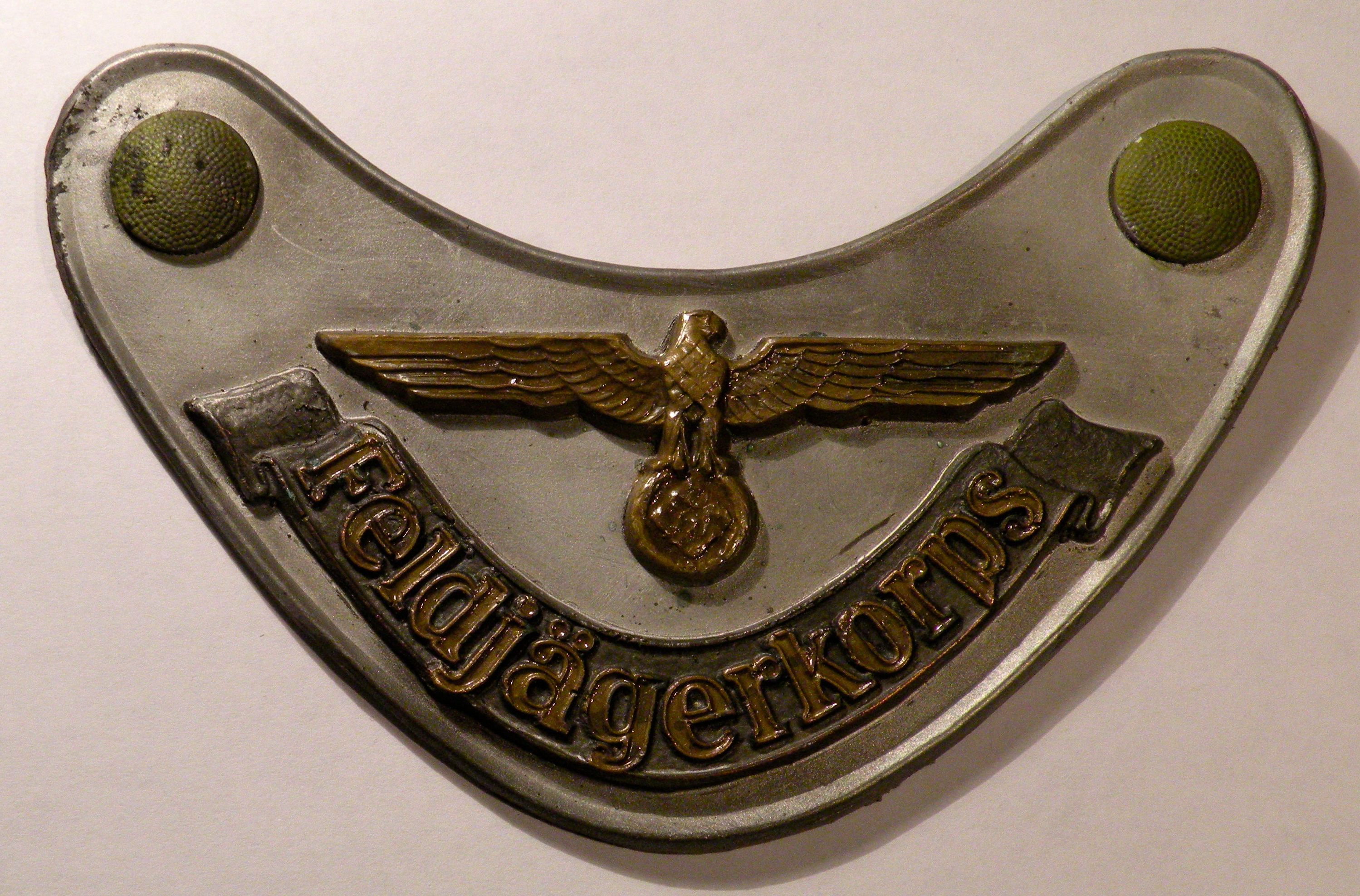 Ringkragen Feldjägerkorps.